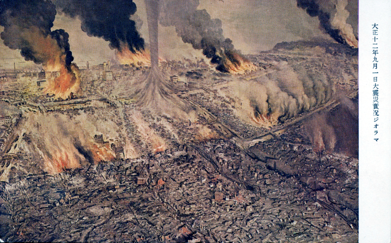 「横浜市 市民博物館 記念エハガキ」6枚入のうちの1枚。旧 横浜市震災記念館の展示物。